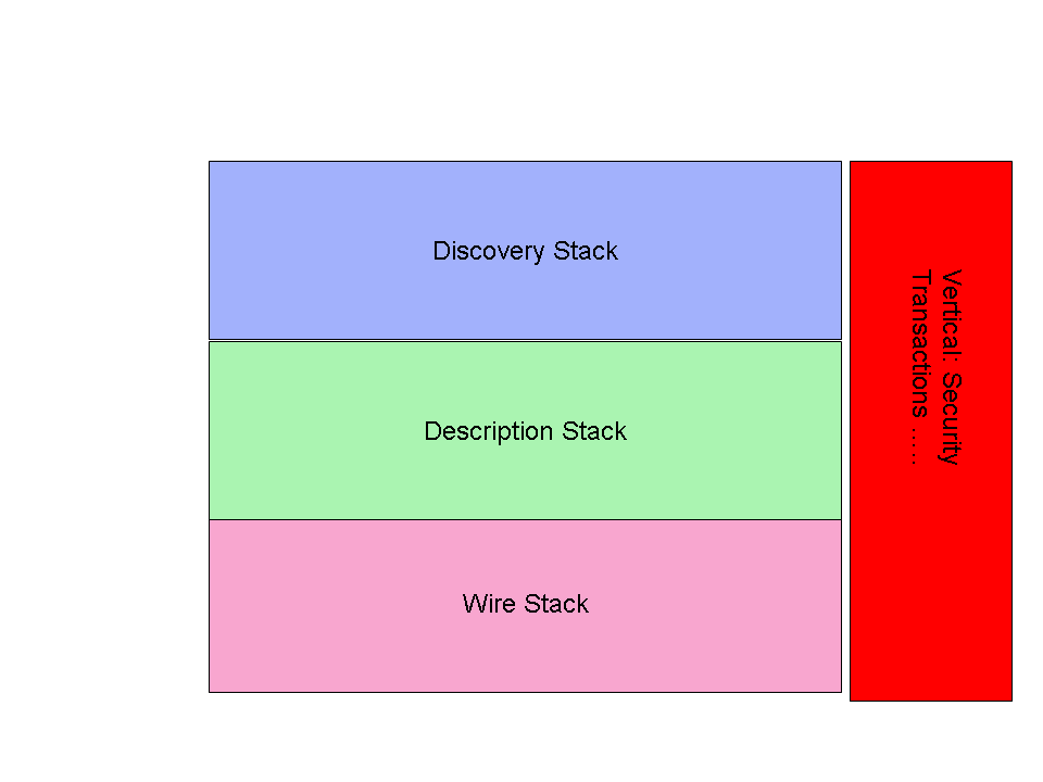 מחסנית שירותי רשת